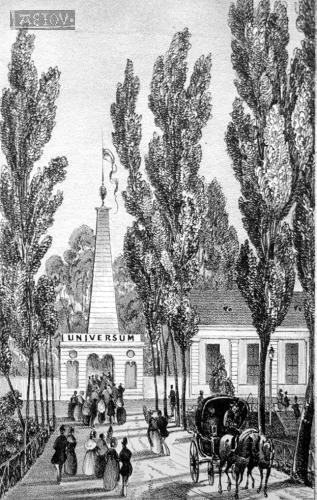 Historische Lithografie des Vergnügungs-Etablissements Neues Universum in Wien (um 1840). An der Stelle entstand später der Nordwestbahnhof. Die Anlage lag direkt am Fahnenstangenwasser.